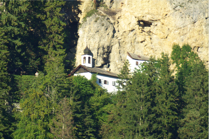 Einsiedelei